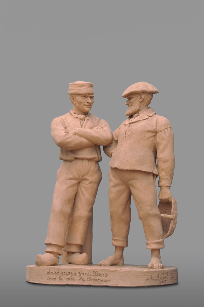 Deux marchands, Auguste Nayel